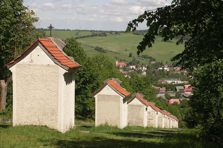 Jiřetín pod Jedlovou (Sankt Georgenthal), Czech Republic